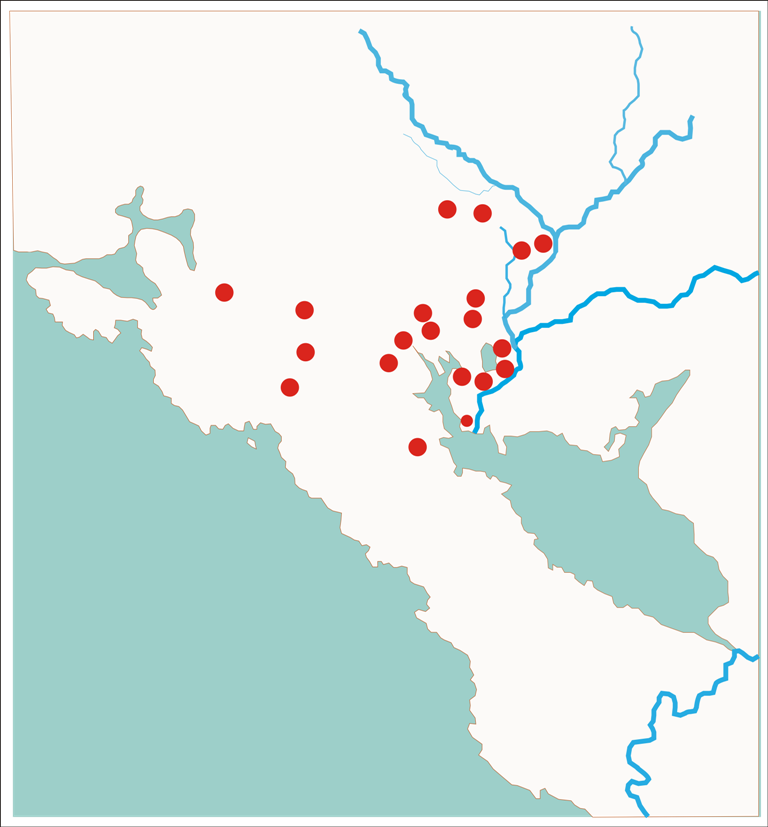 Porodični posjedi Crnojevića.